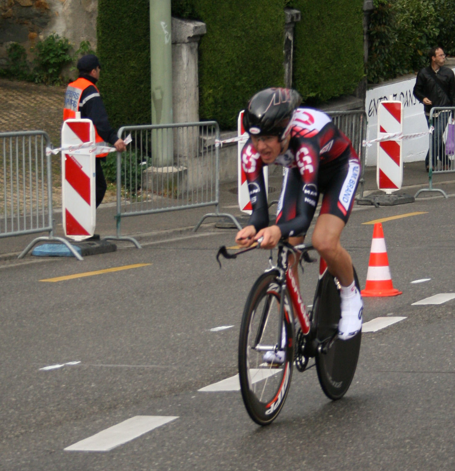 Chris Anker Sorensen prologue du Tour de Romandie 2007